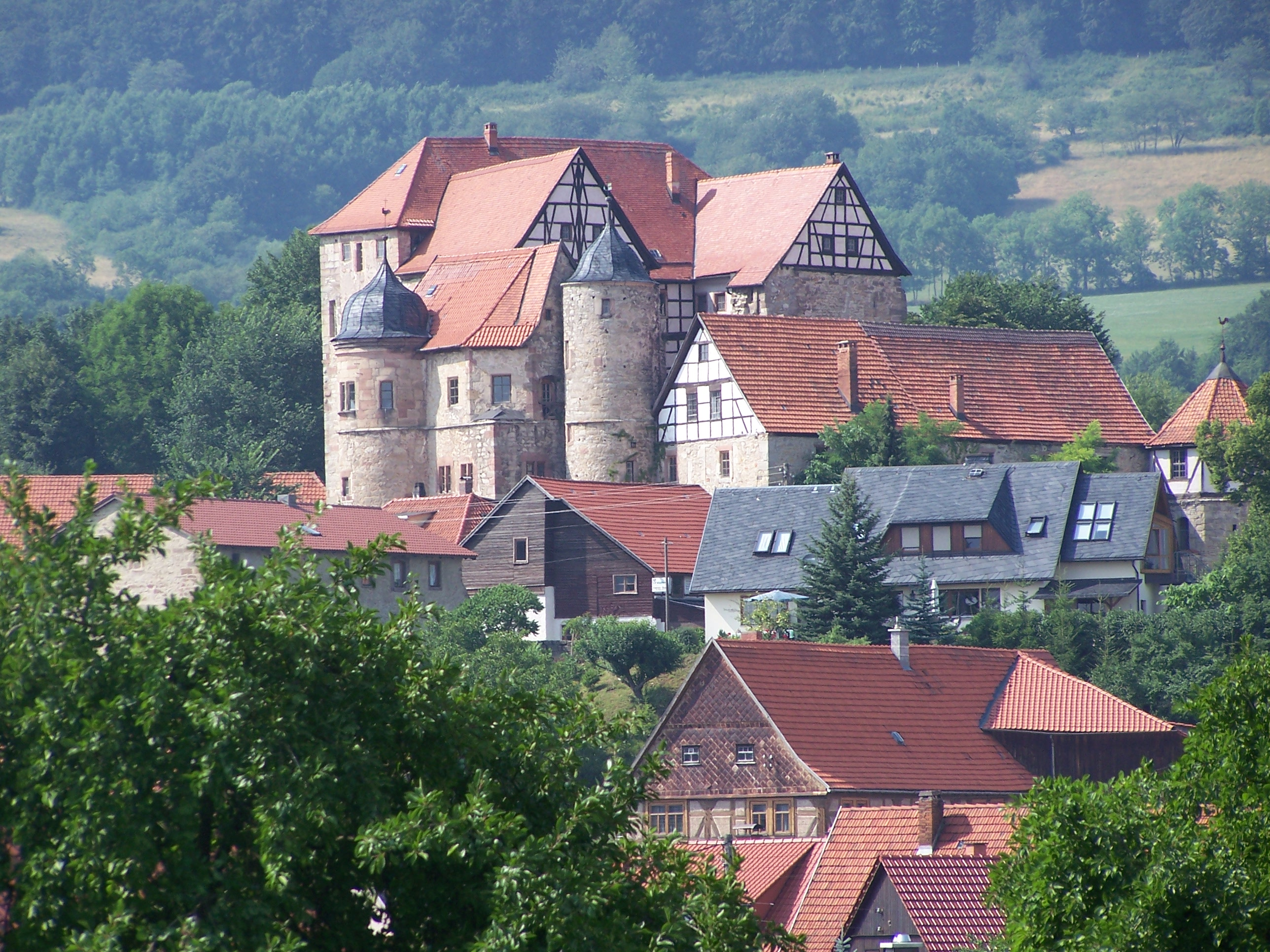 Johanniterburg Kühndorf Südostansicht